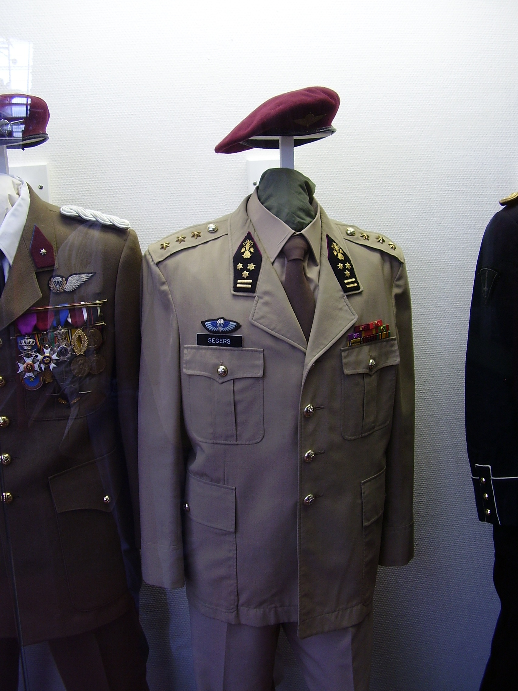 Royal Military Museum Brussels, Musée Royal de l'Armée, Koninklijk Museum van het Leger en de Krijgsgeschiedenis